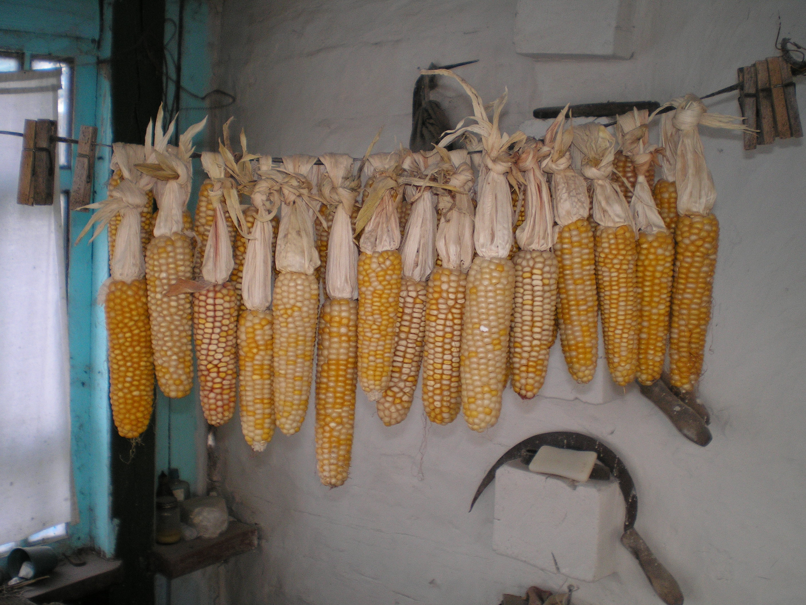 києхи